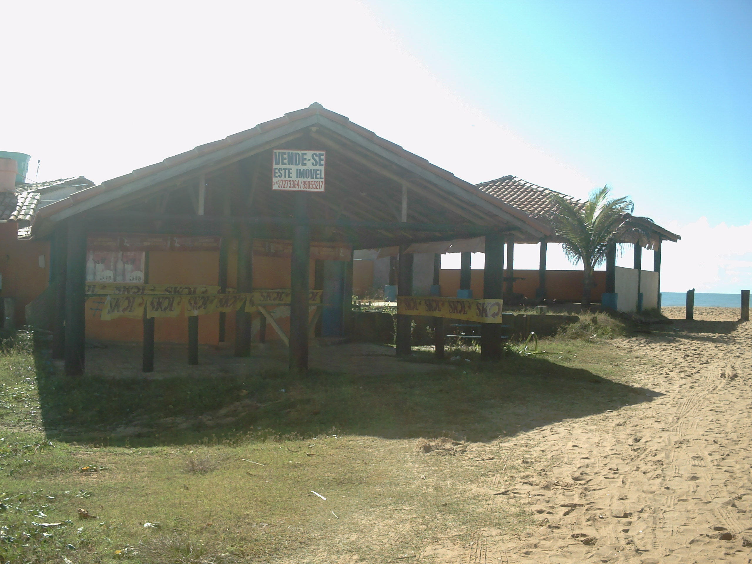 Vende-se...:(